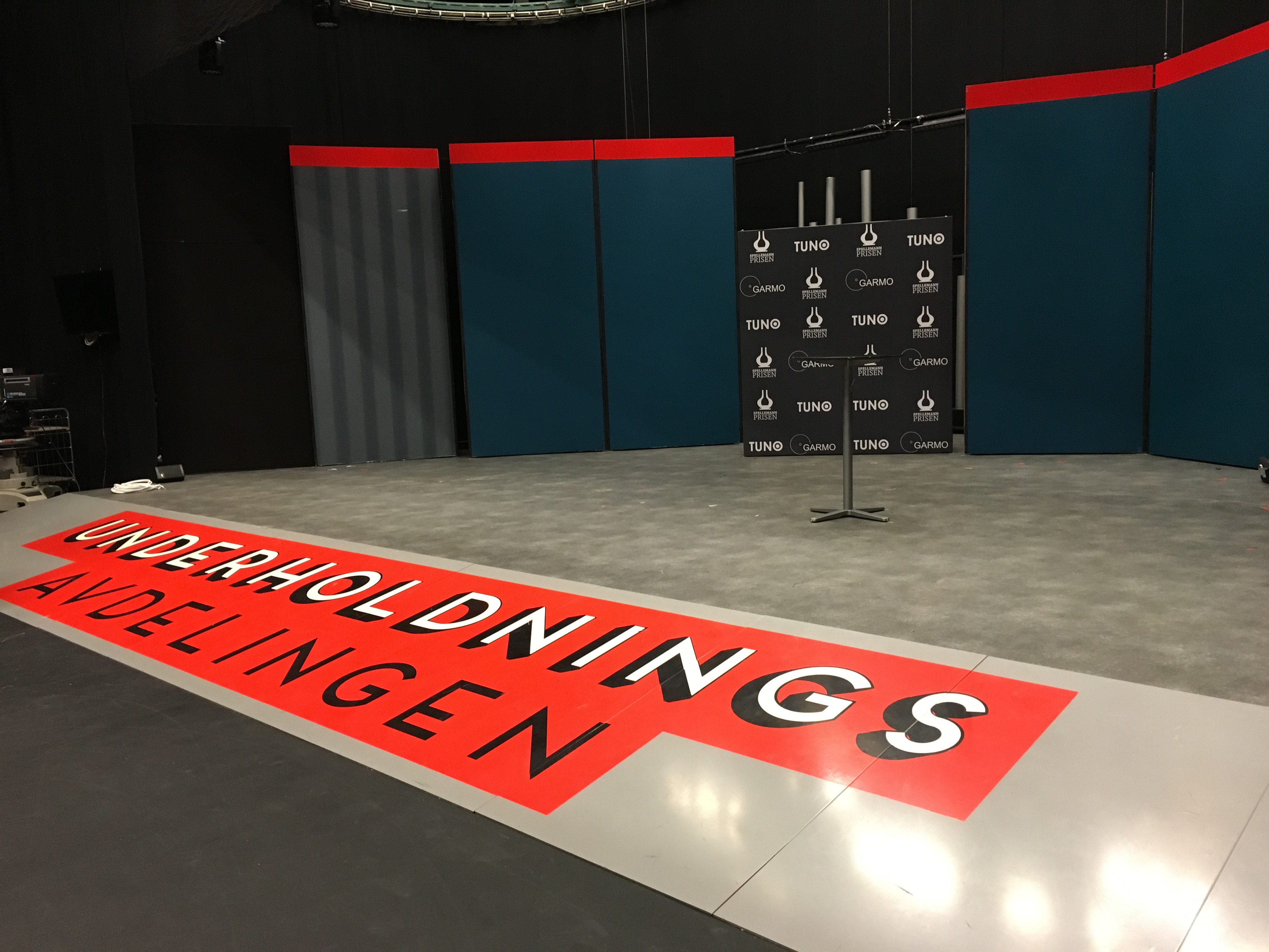 Studio 2 på NRK Marienlyst rigget med kulisser til tv-programmet "Underholdningsavdelingen".